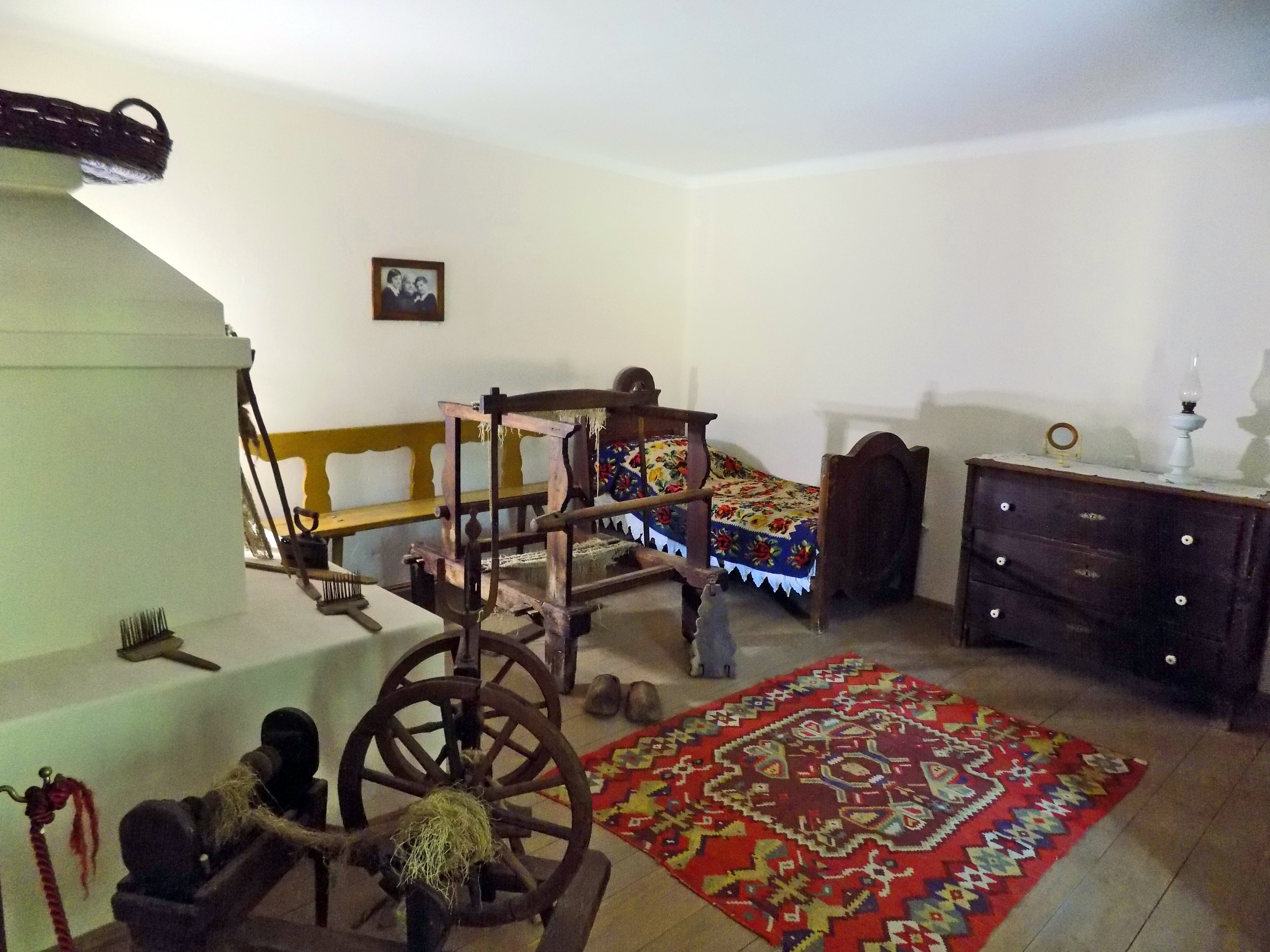 Srpski (latinica): Pupinova rodna kuća - "Ženska" soba sa zidanom peći